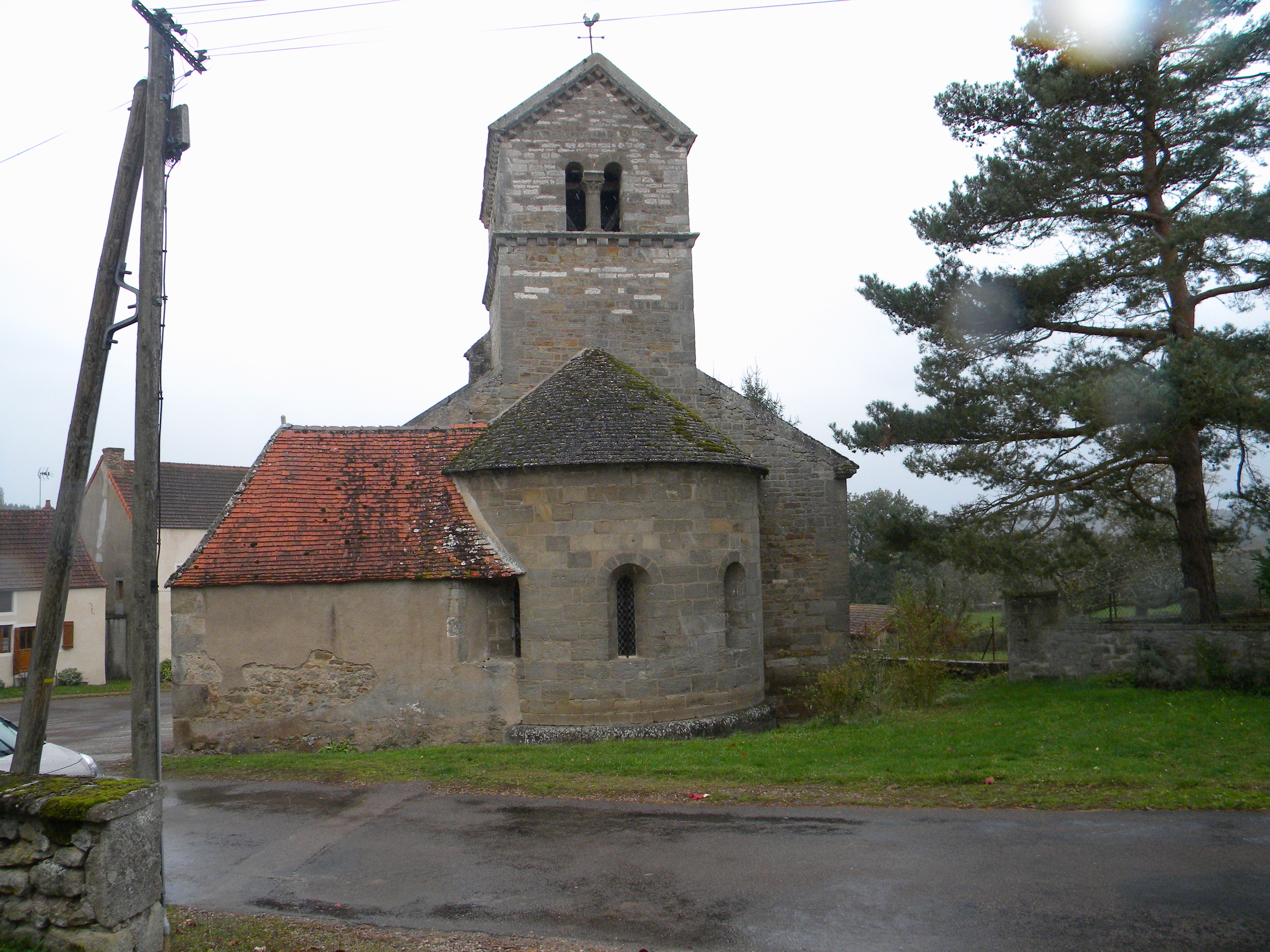 Preĝejo